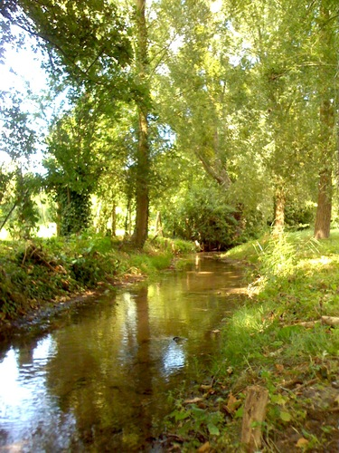 Le Sauceron, ruisseau de Richebourg (Yvelines, France)